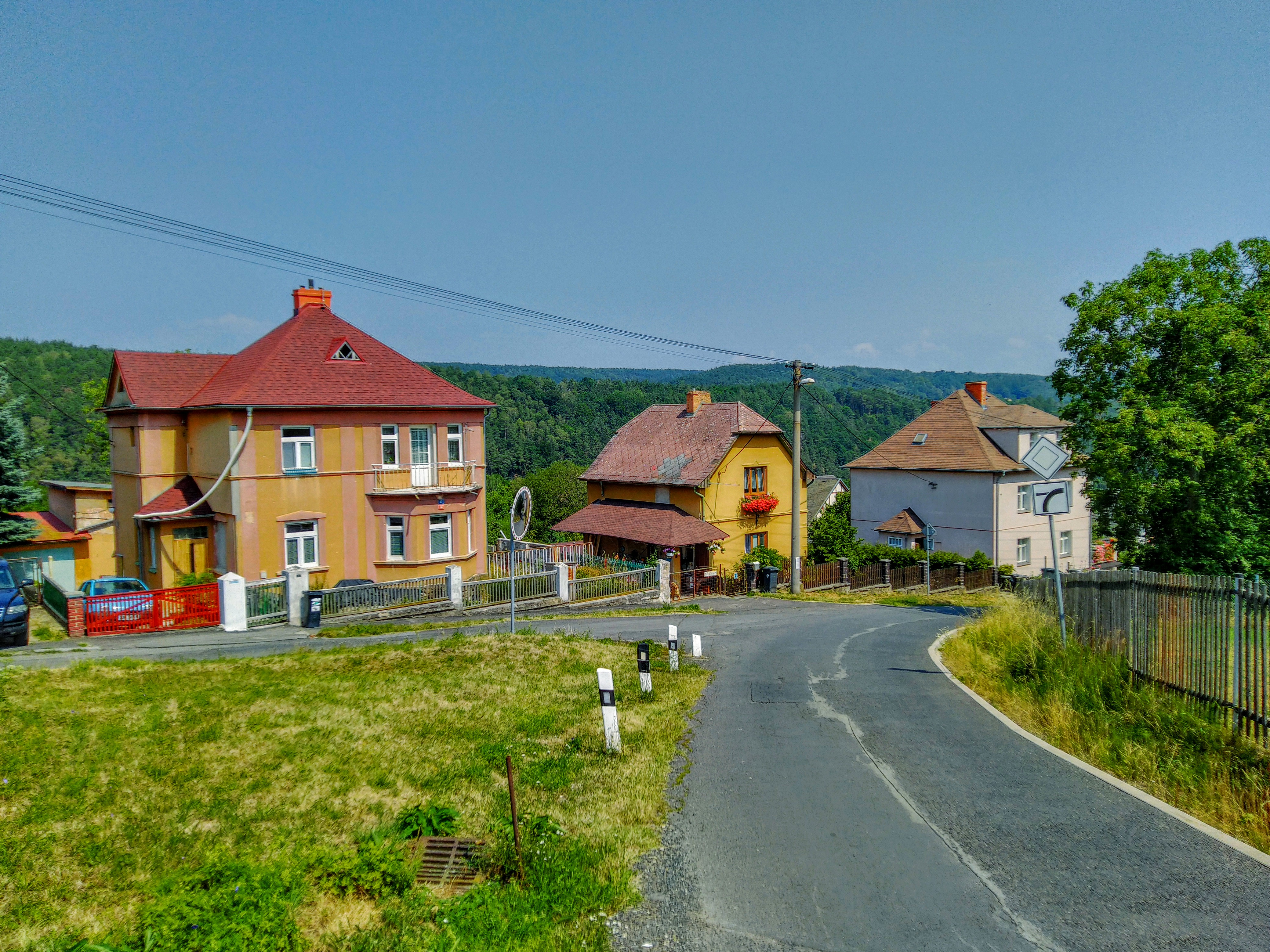 Pohled v Děčín-Horní Oldřichov na křižovatku ulic Oldřichovské a Berounské.